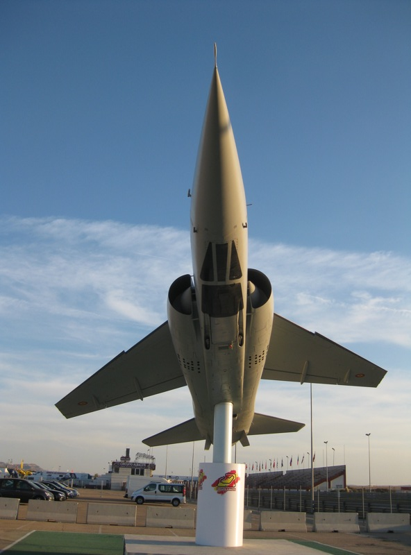 Mirage F1 at Albacete